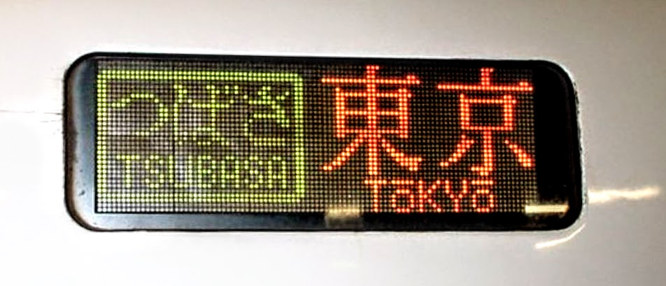 400系試作車・LED方向幕